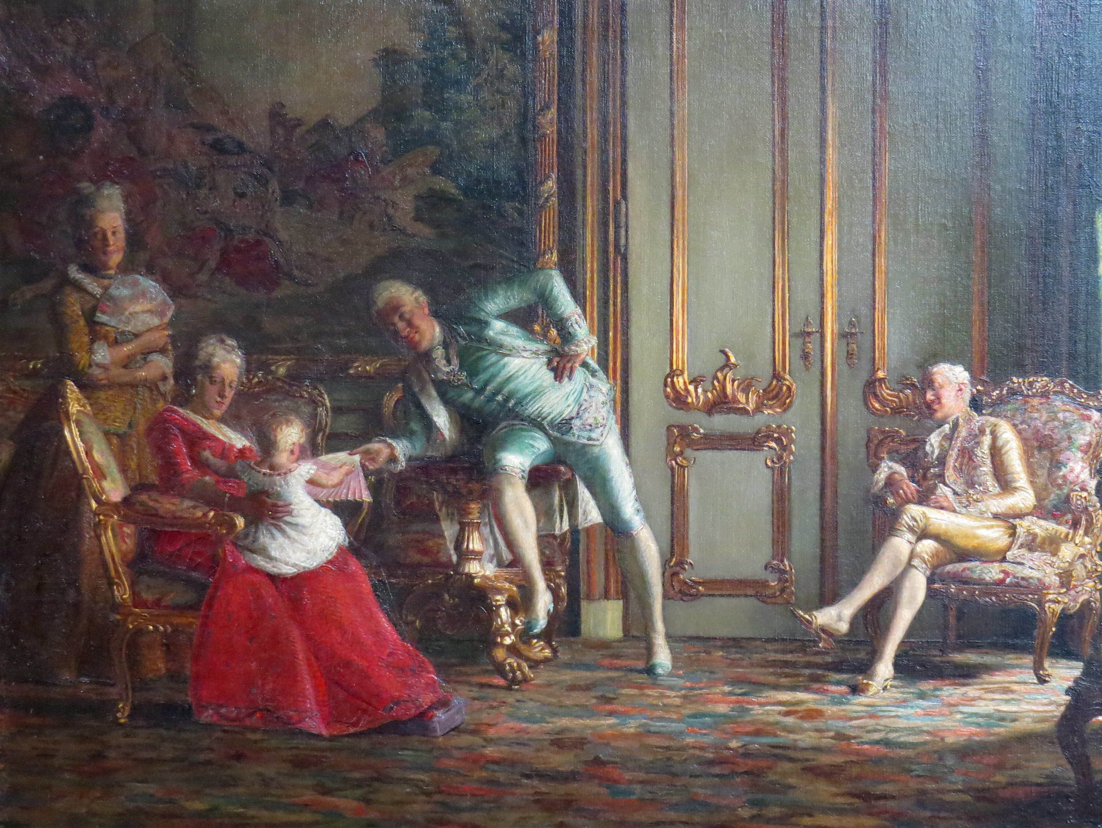 Udsnit af Interiør fra Christian VII's Hof, 1881, af Kristian Zahrtmann (1843-1917], Den Hirschsprungske Samling, København